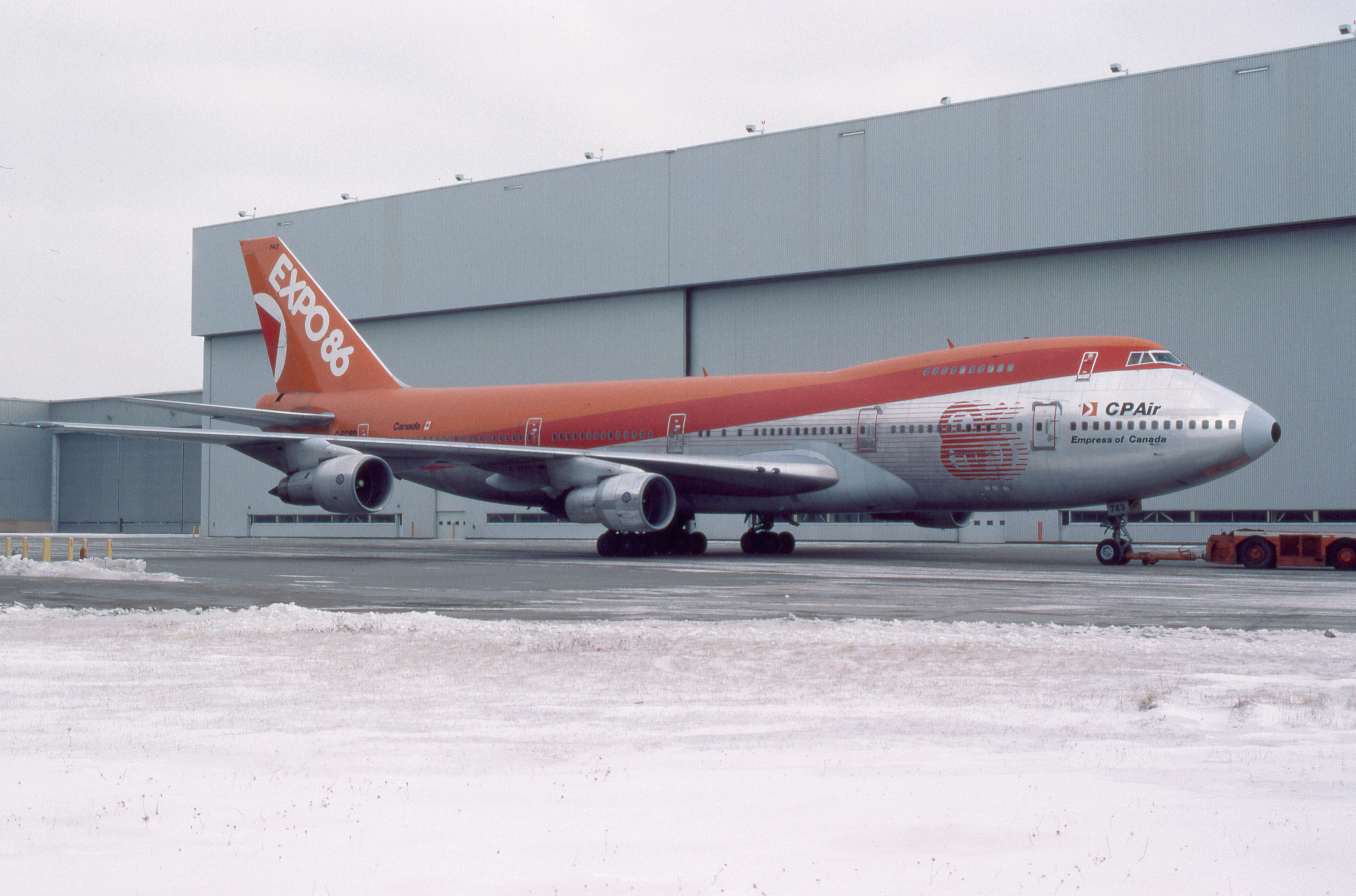 December 1985